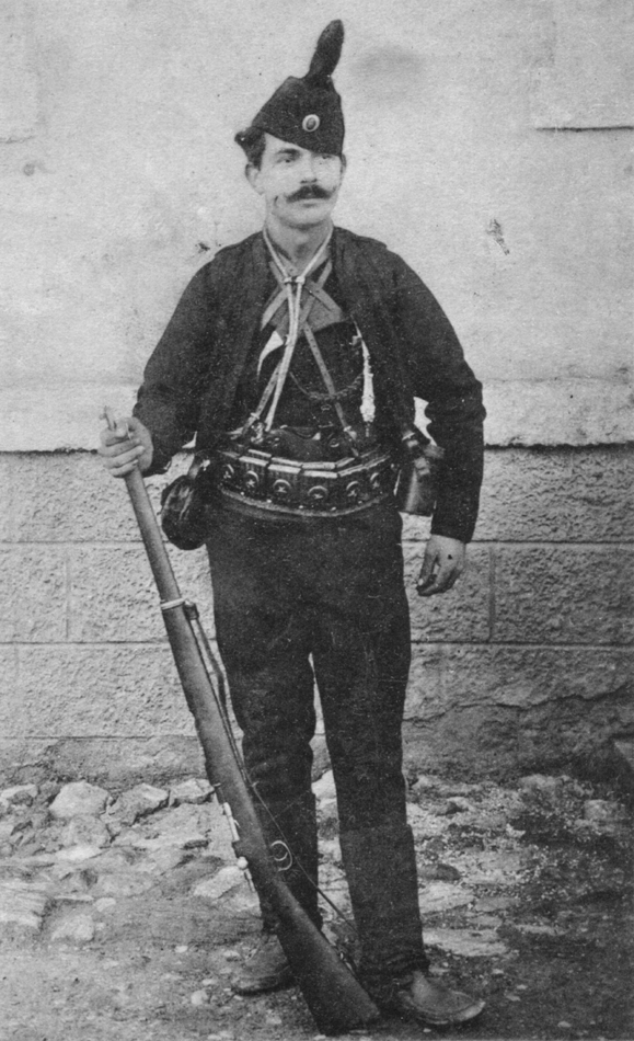 Српски (ћирилица): Војвода Илија Трифуновић Бирчанин